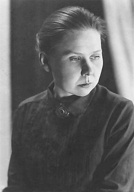 Portreto de Hilda Dresen, estona esperantistino.